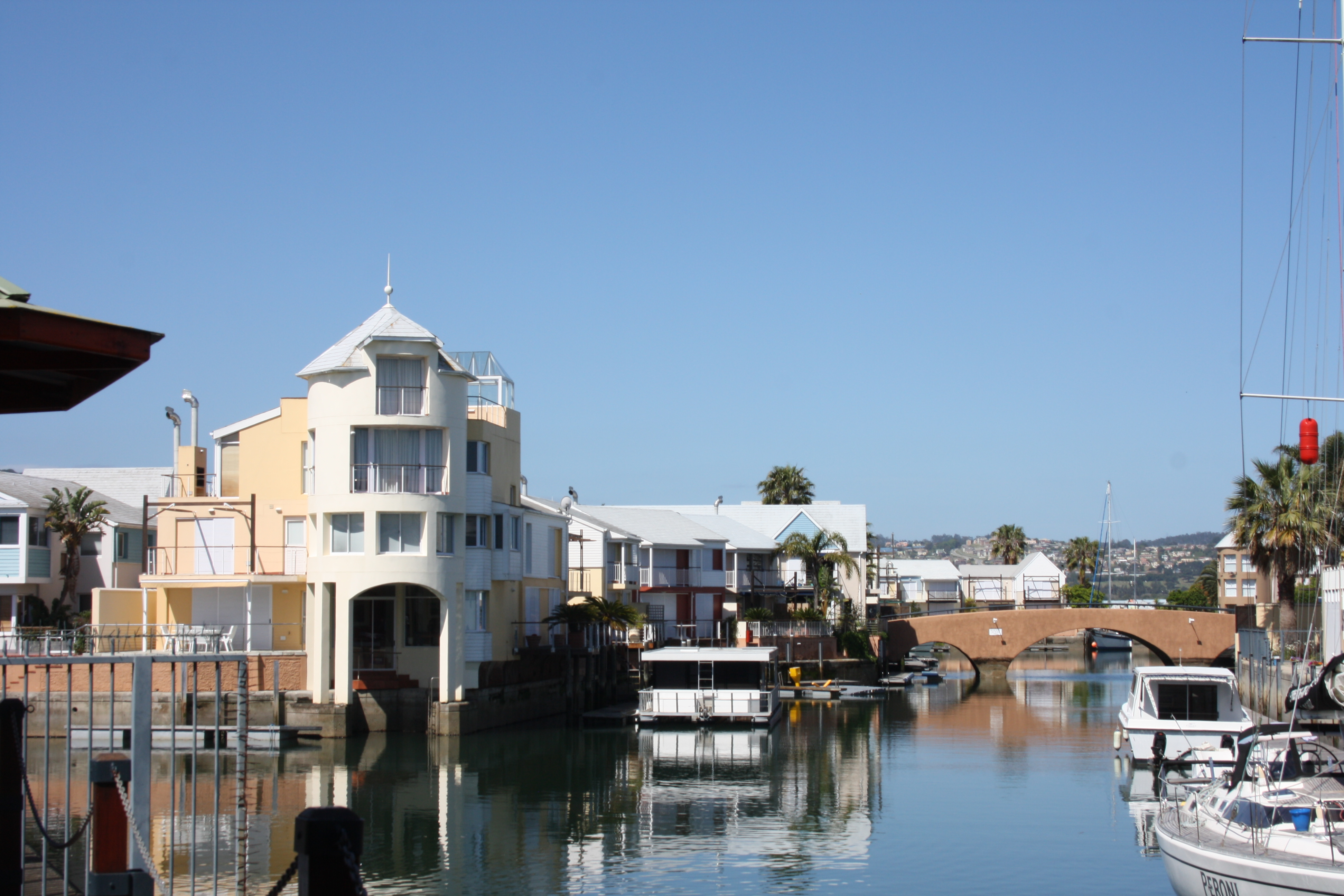 Marina de Knysna Quays